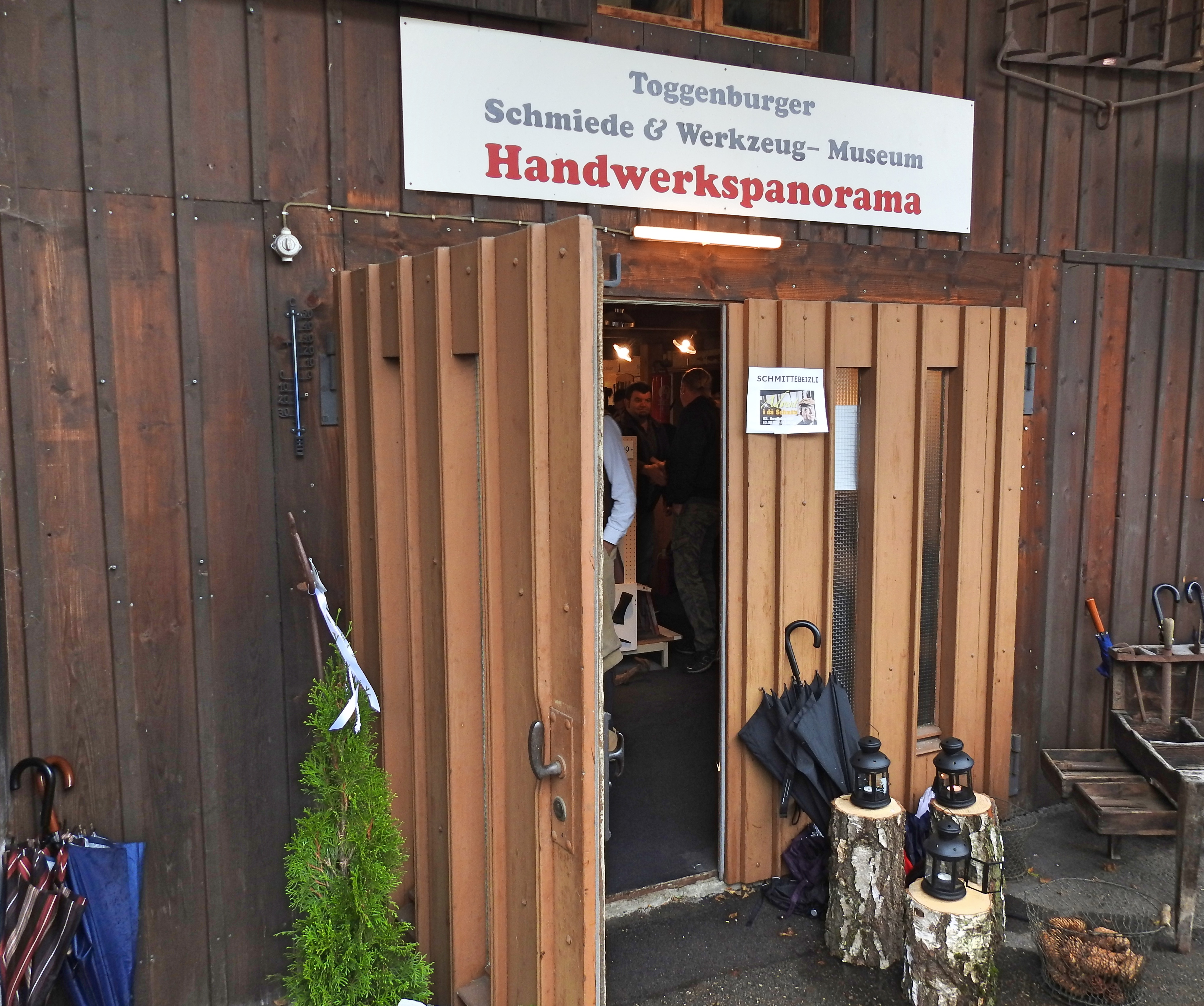 Eingang zum Handwerkspanorama des Toggenburger Schmiede- und Werkzeigmuseum Bazenheid, Schweiz